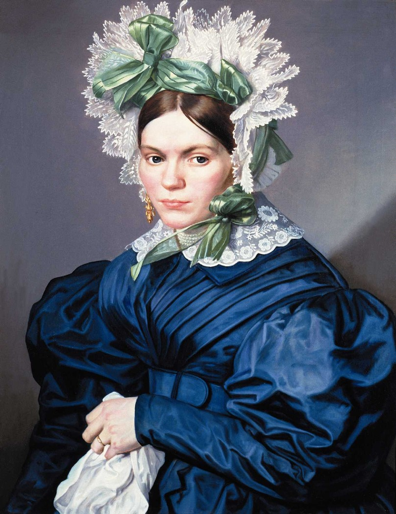 Antonín Machek - portrét dámy z rodiny Patočků